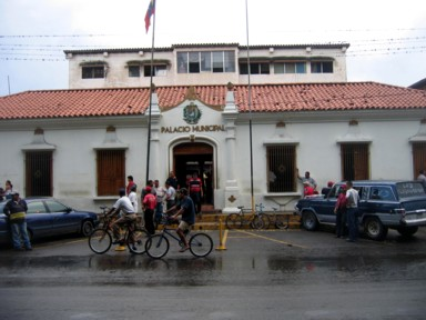 Casa Guipuzcoana, Actual Palacio Municipal